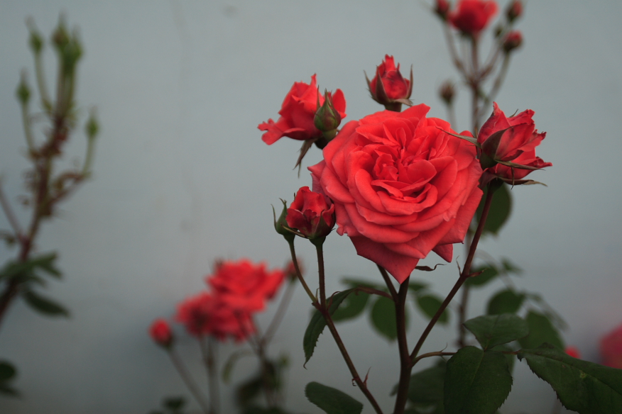 月季, Rose